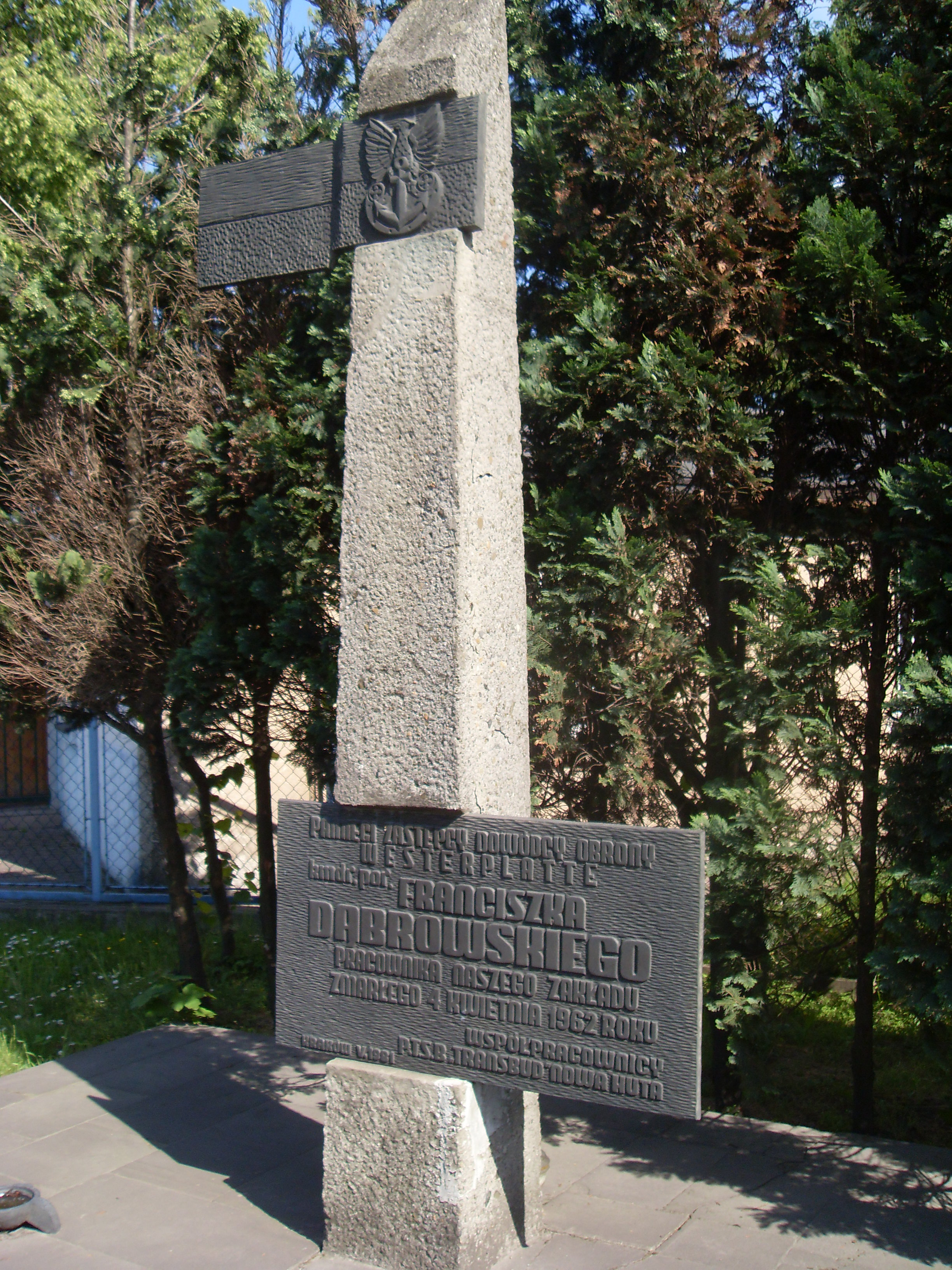 Pomnik ku czci Franciszka Dąbrowskiego przy ul. Ujastek, przed wejściem do "Transbudu" w Nowej Hucie, gdzie pracował jako dozorca.